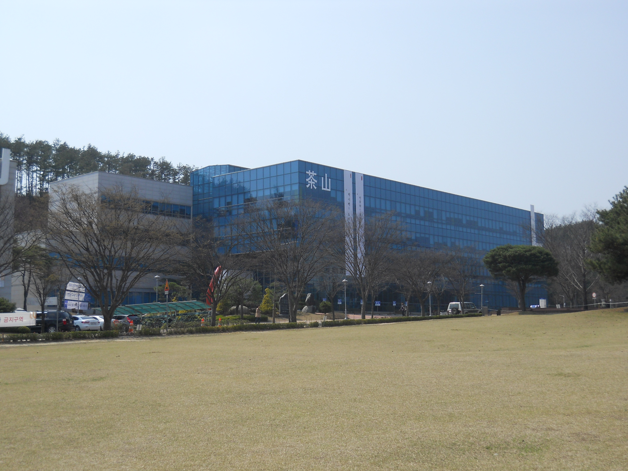 2015년 4월 텔레토비 동산에서 바라본 다산정보관의 모습